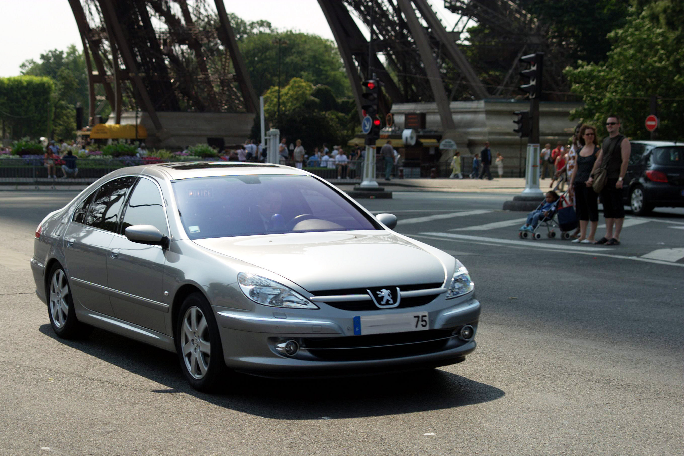 Peugeot-607-CRW 1653